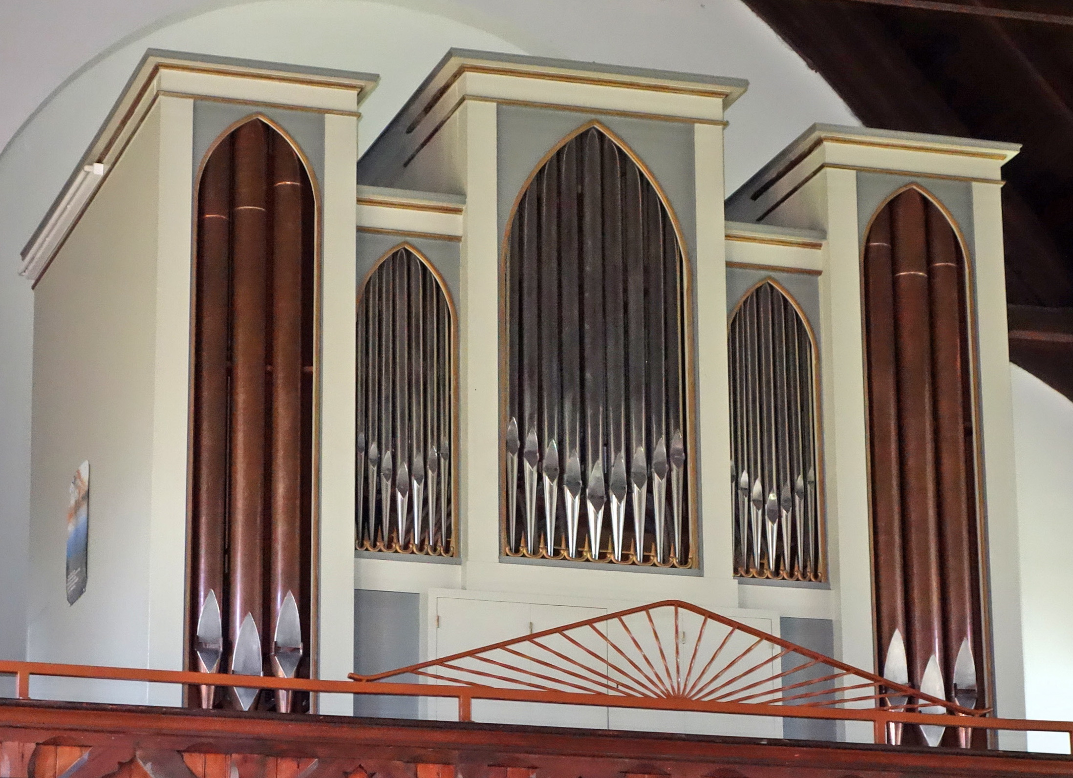 Orgel in Hansühn, Schleswig-Holstein